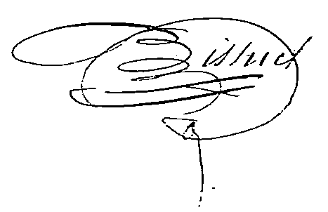 Lyon artistique. Architectes : notices biographiques et bibliographiques avec une table des édifices et la liste chronologique des noms / par E.-L.-G. Charvet.